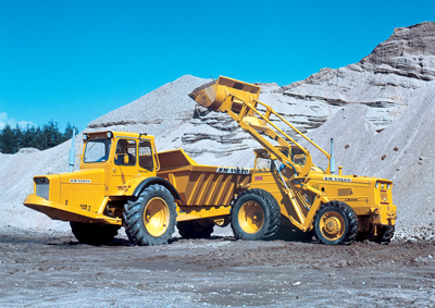 Volvo-BM DR631 "Gravel Charlie", Volvo-BM LM 640 uit 1965